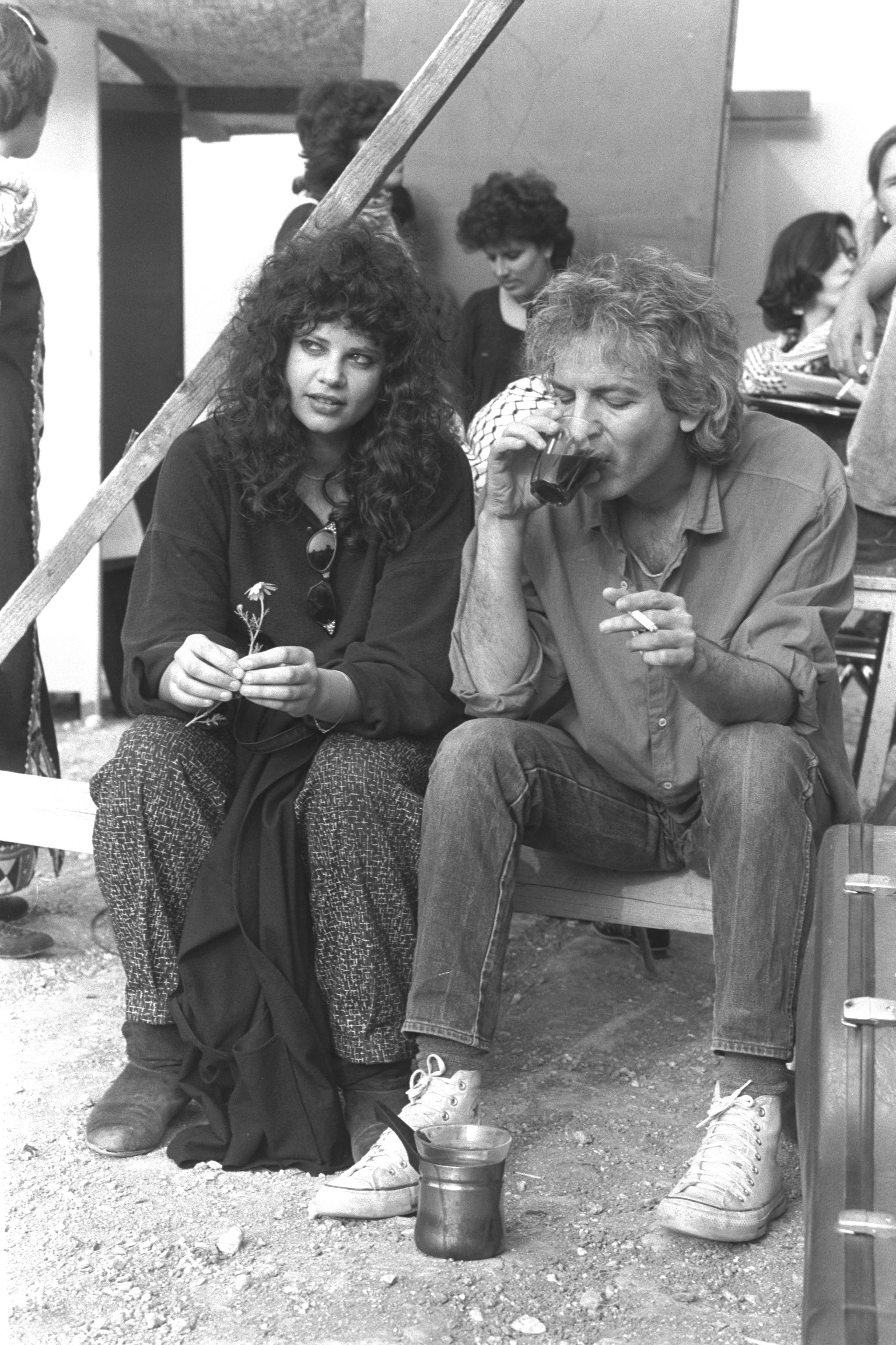 Singers Shalom Hanoch and Daphna Armoni getting ready to perform at the first Israel Peace Festival in Neve Shalom. שלום חנוך ודפנה ערמוני מתכוננים להופעה בפסיטבל ישראל לשלום בנווה שלום Photo: HERMAN CHANANIA.